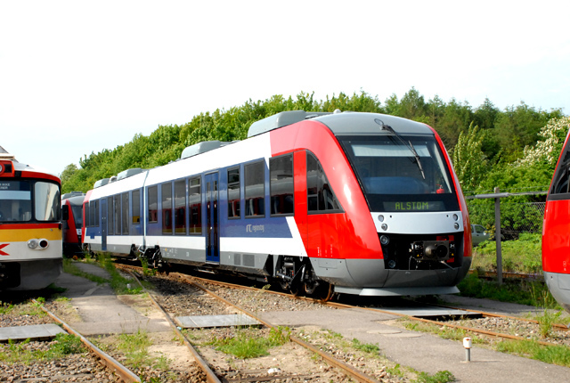 De nieuwe VT 2039 van Regionstog te Hårlev.